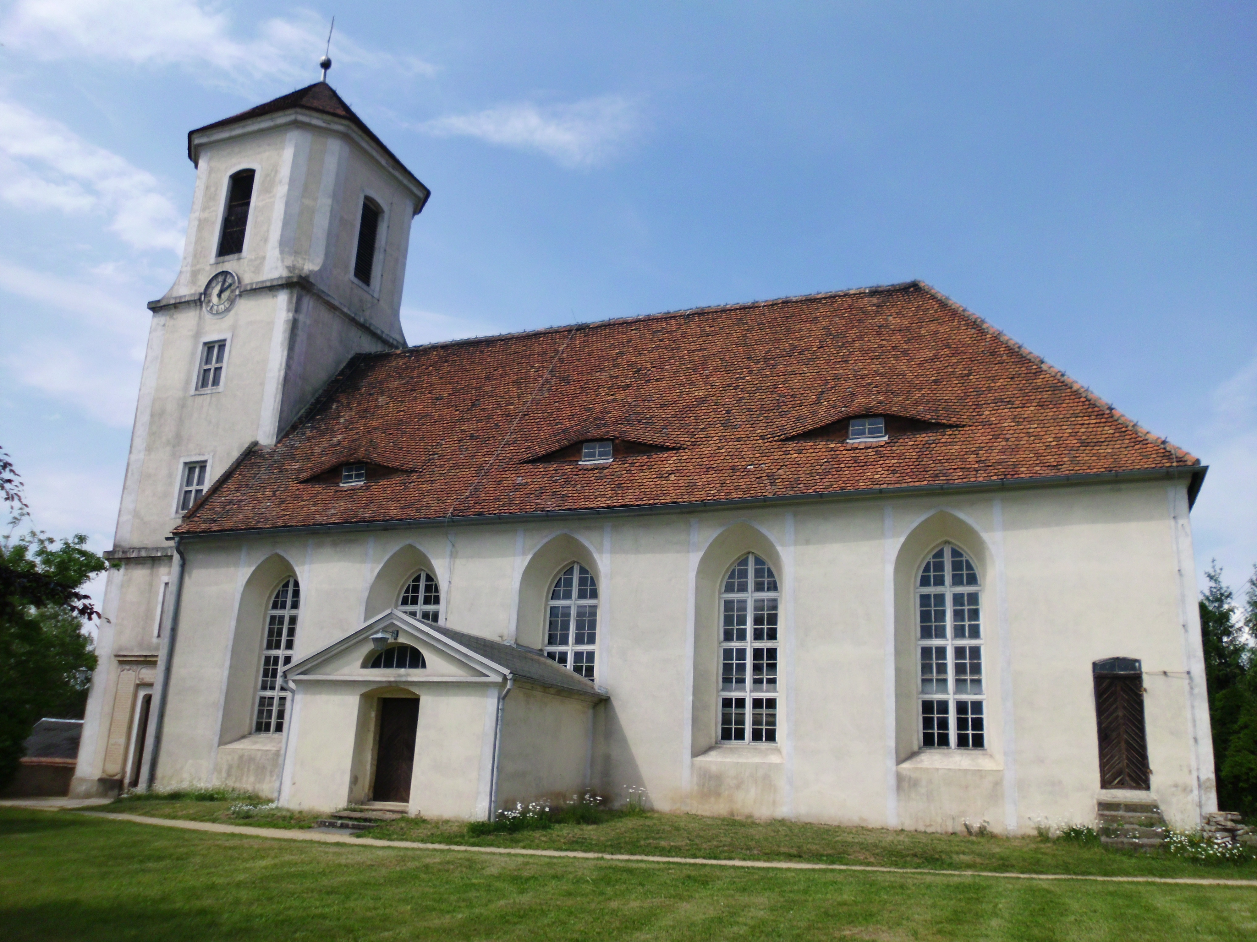 Evangelisch-Lutherisches Kirche Baruth. Über den Erstbau fehlen Unterlagen. 1813 brannte die Kirche vollständig ab. Das an gleicher Stelle erbaute Gotteshaus wurde 1819 geweiht.